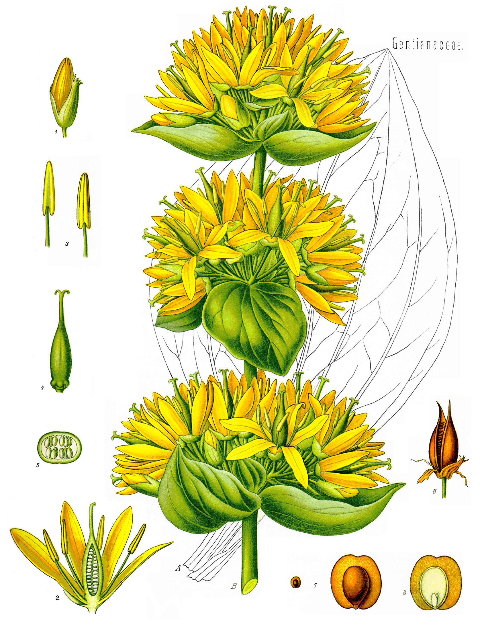 Gelber Enzian. A Basalblatt, natürl. Grösse; B oberer Theil eines blühenden Stengels, desgl.; 1 Blüthenknospe, etwas vergrössert; 2 Blüthe im Längsschnitt, vergrössert; 3 Staubgefässe, desgl.; 4 Stempel, desgl.; 5 Fruchtknoten im Querschnitt, desgl.; 6 aufgesprungene Frucht, natürl. Grösse; 7 Same, natürl. Grösse und vergrössert; 8 derselbe im Längsschnitt, vergrössert.